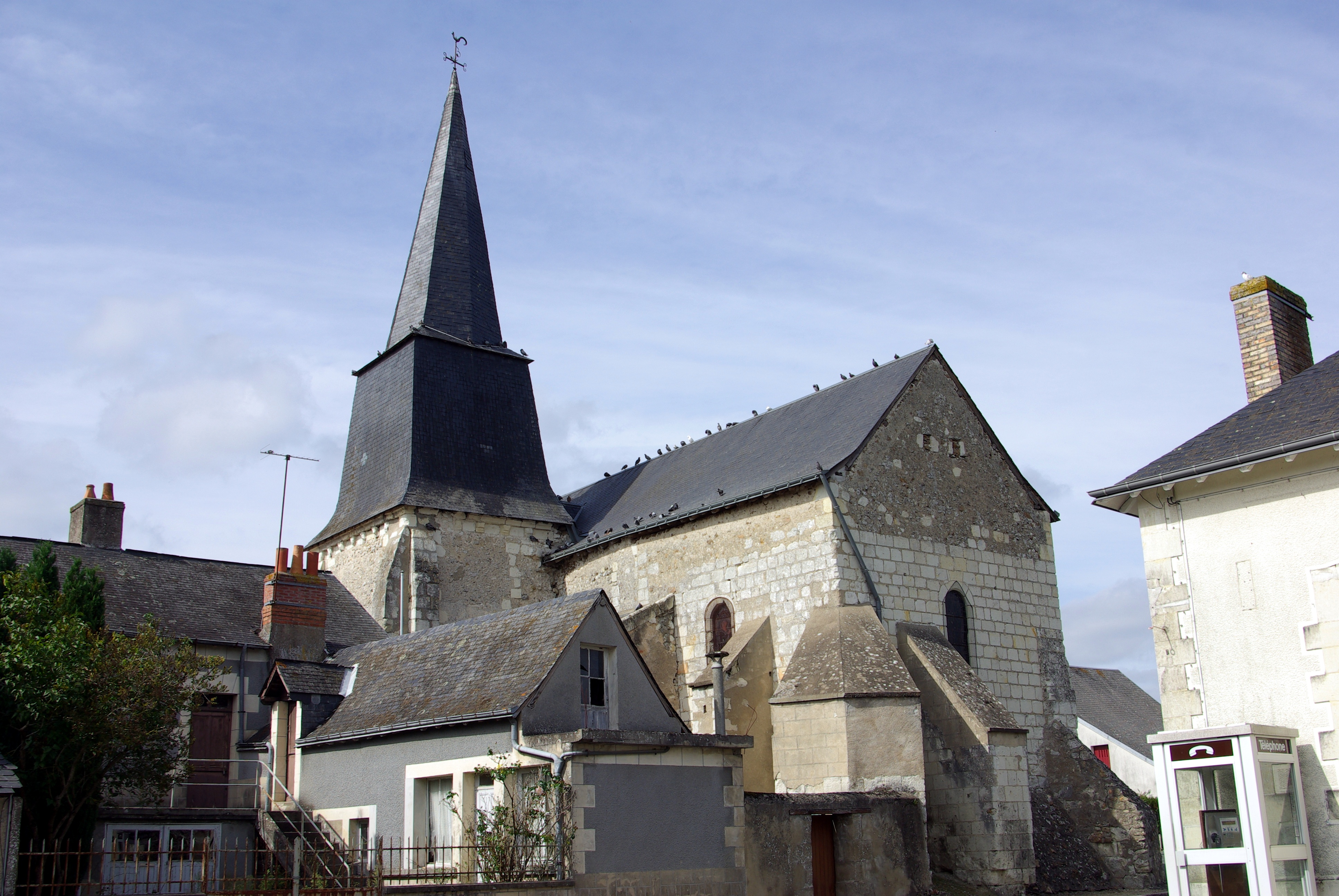 Église Saint-Aubin d'Avrillé-les-Ponceaux.